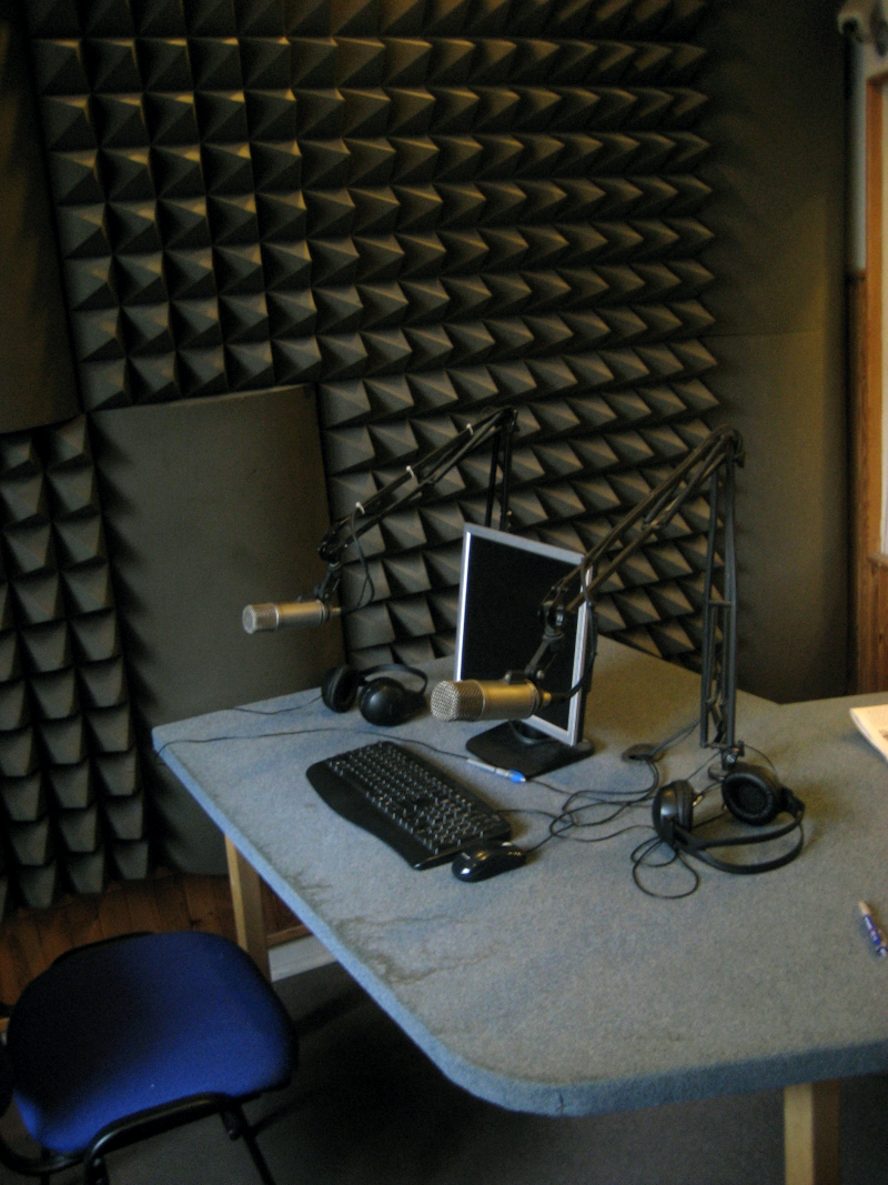 Studio Radio Afera Poznań.